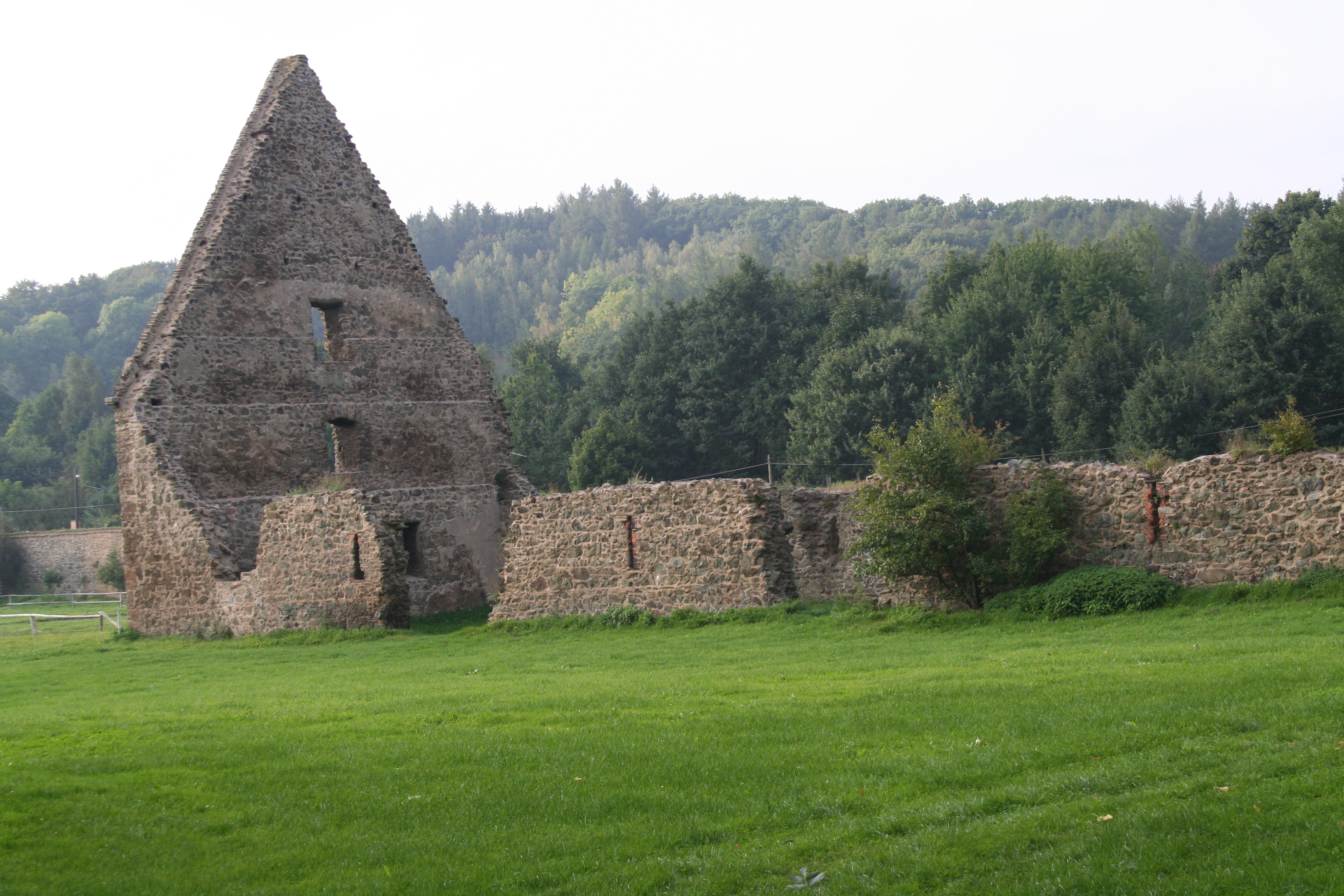 Altzella Schüttgebäude